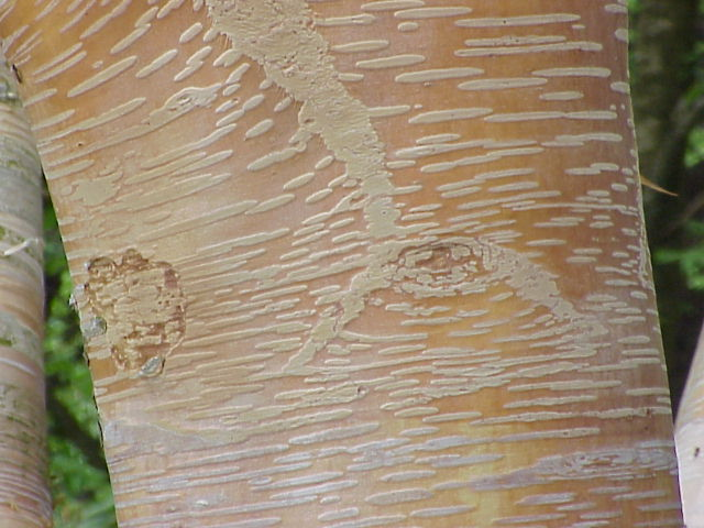 Species: Betula ermanii Family: Betulaceae Image No. 3